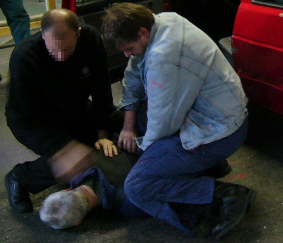 Training zum polizeilichen Einsatzverhalten: Sicherung einer Person am Boden unter Anwendung von Unmittelbarem Zwang.